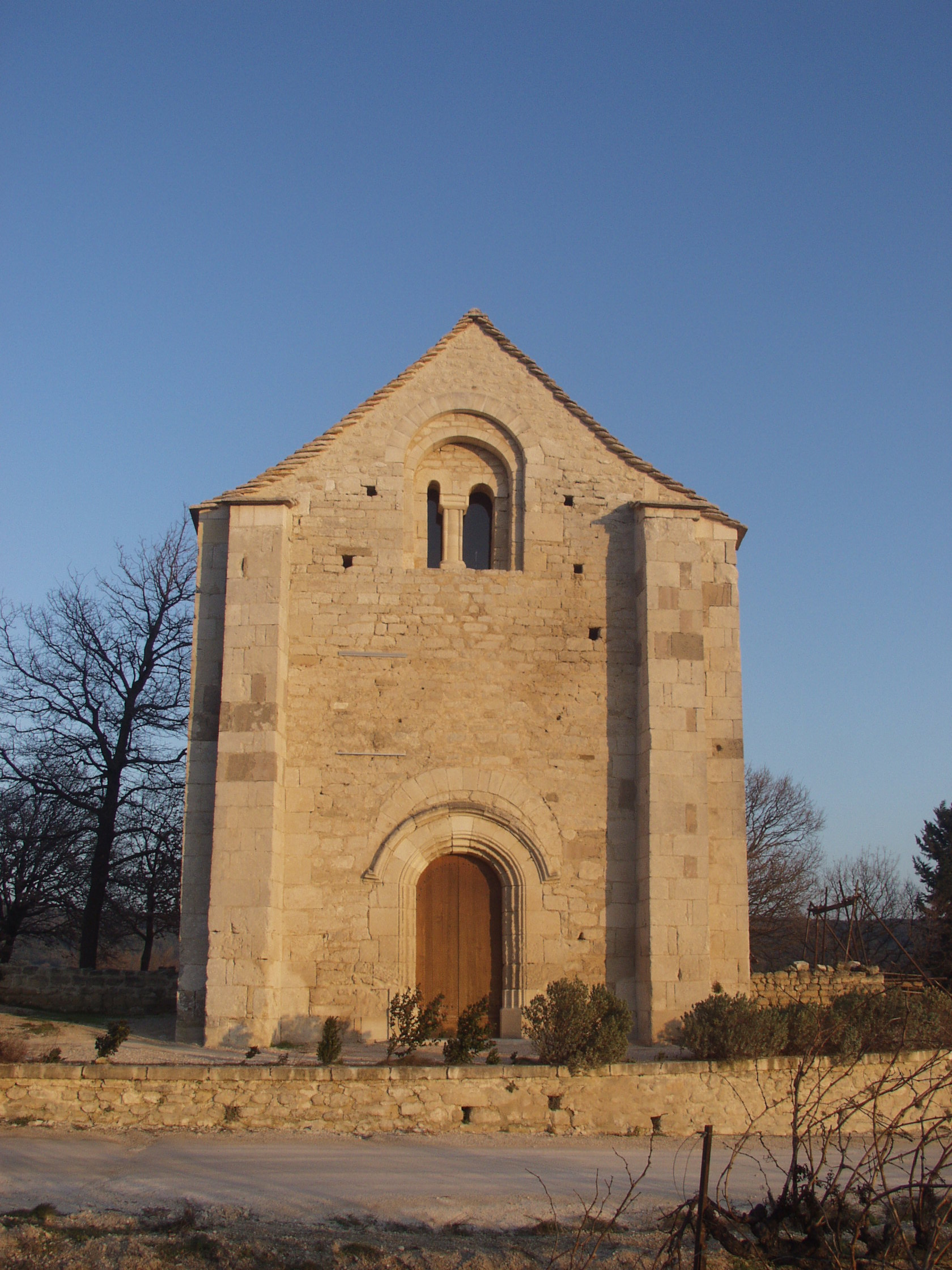 Chapelle Saint-Etienne, Saint-Hilaire-d'Ozilhan